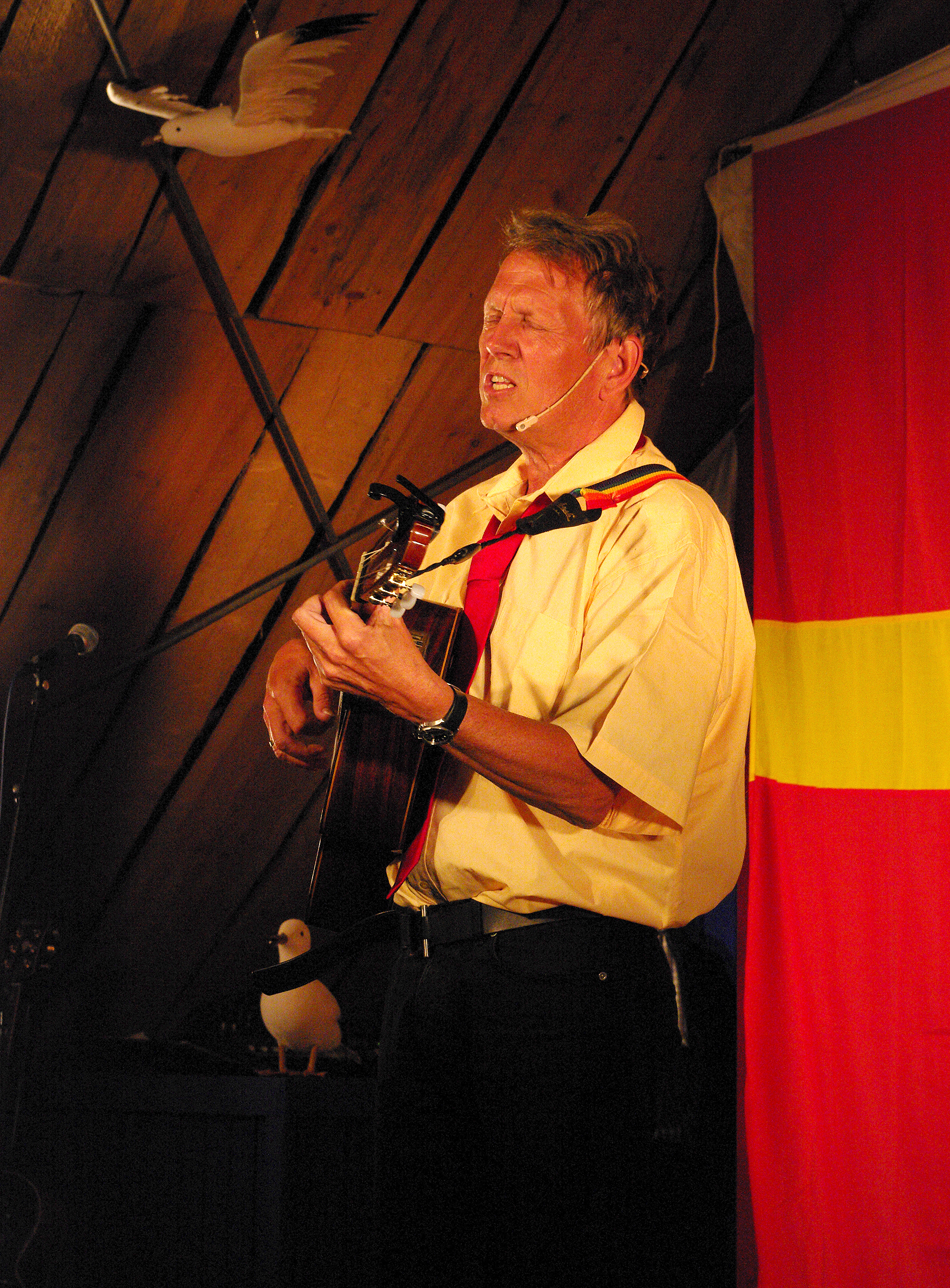 Mikael Neumann år 2011.